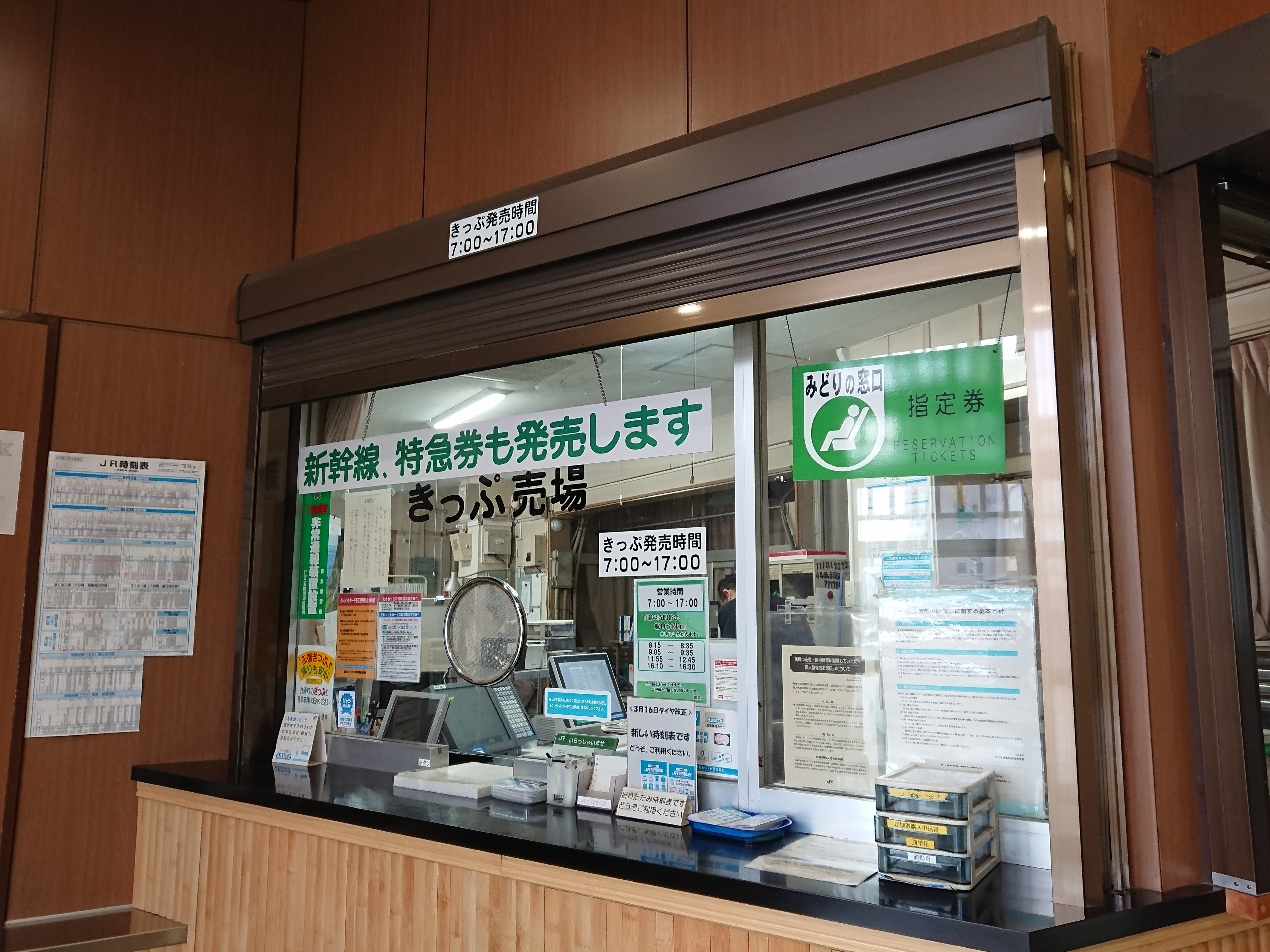 越後川口駅のみどりの窓口（JNB運営）